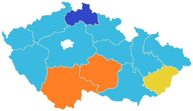 Volby do zastupitelstev krajů, vítězné strany v jednotlivých krajích (světle modrá ANO, oranžová ČSSD, tmavě modrá Starostové pro Liberecký kraj, žlutá KDU-ČSL).